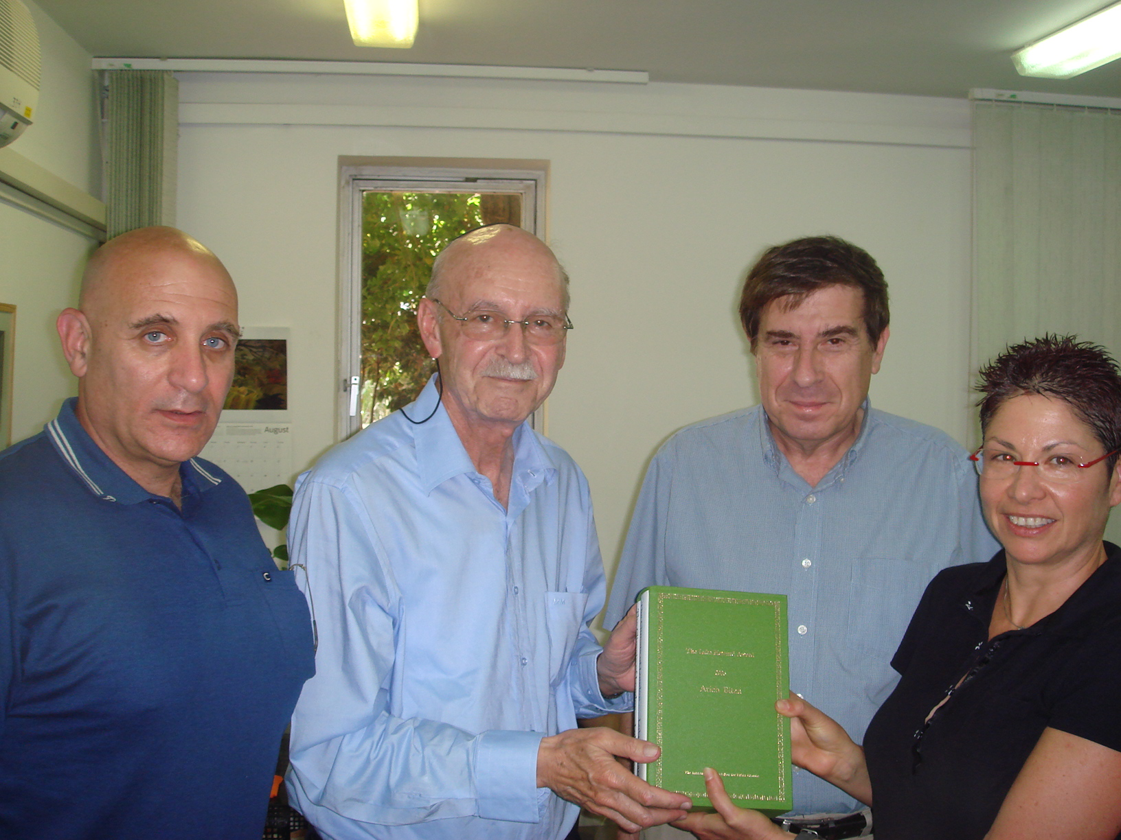 התמונה צולמה במשרד דיקן הפקולטה למדעי הרוח . מופיעים בה: פרופ' שלמה בידרמן (הדיקן) פרופ' הדס סערוני , פרופ' איל בן דור וביניהם פרופ' אריה ביתן. לכבוד קבלת פרס Howard Luke מטעם הארגון הבינלאומי לקלימטולוגיה אורבנית עבור מפעל חיים (שנת 2006).